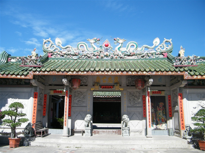 汕頭達濠巡司埠雙忠古廟。